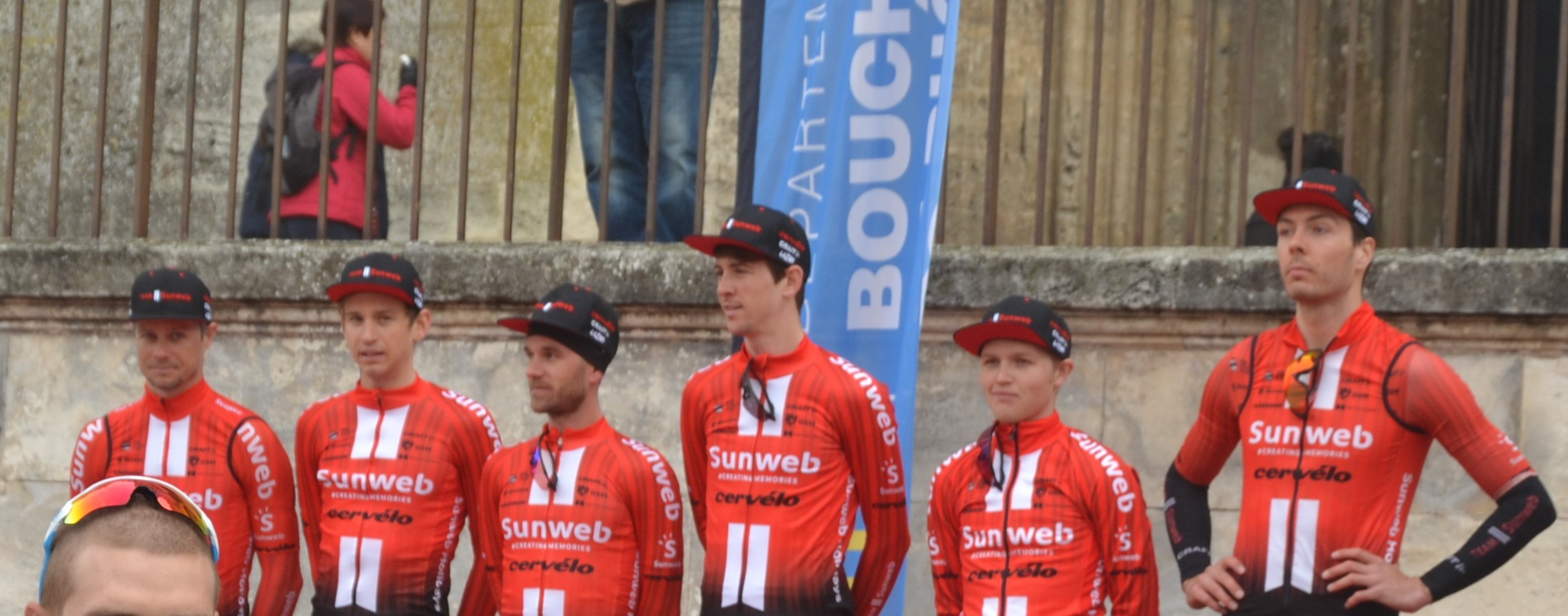 Lors du podium des signatures avant départ de l'étape